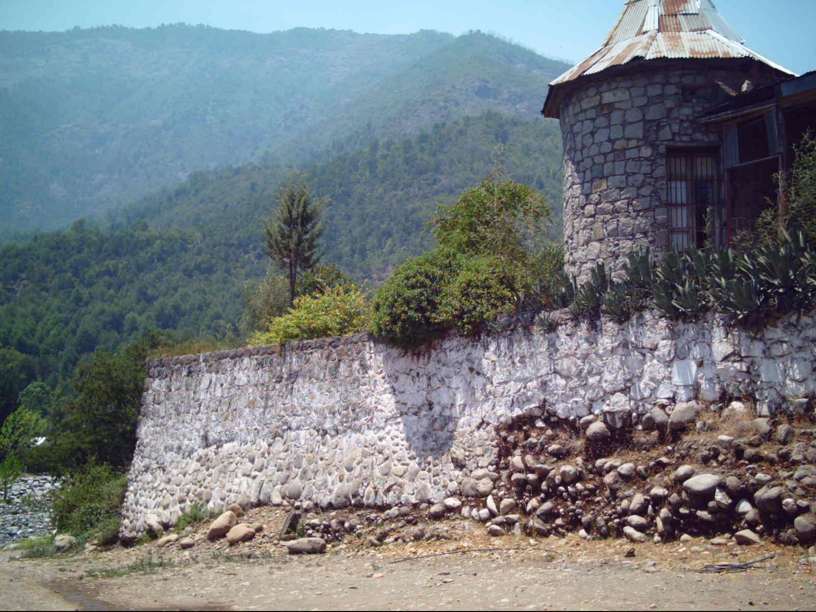 Former Customs building in Los Quenes (antiguo edificio de Aduana en Los Queñes, provincia de Curicó)